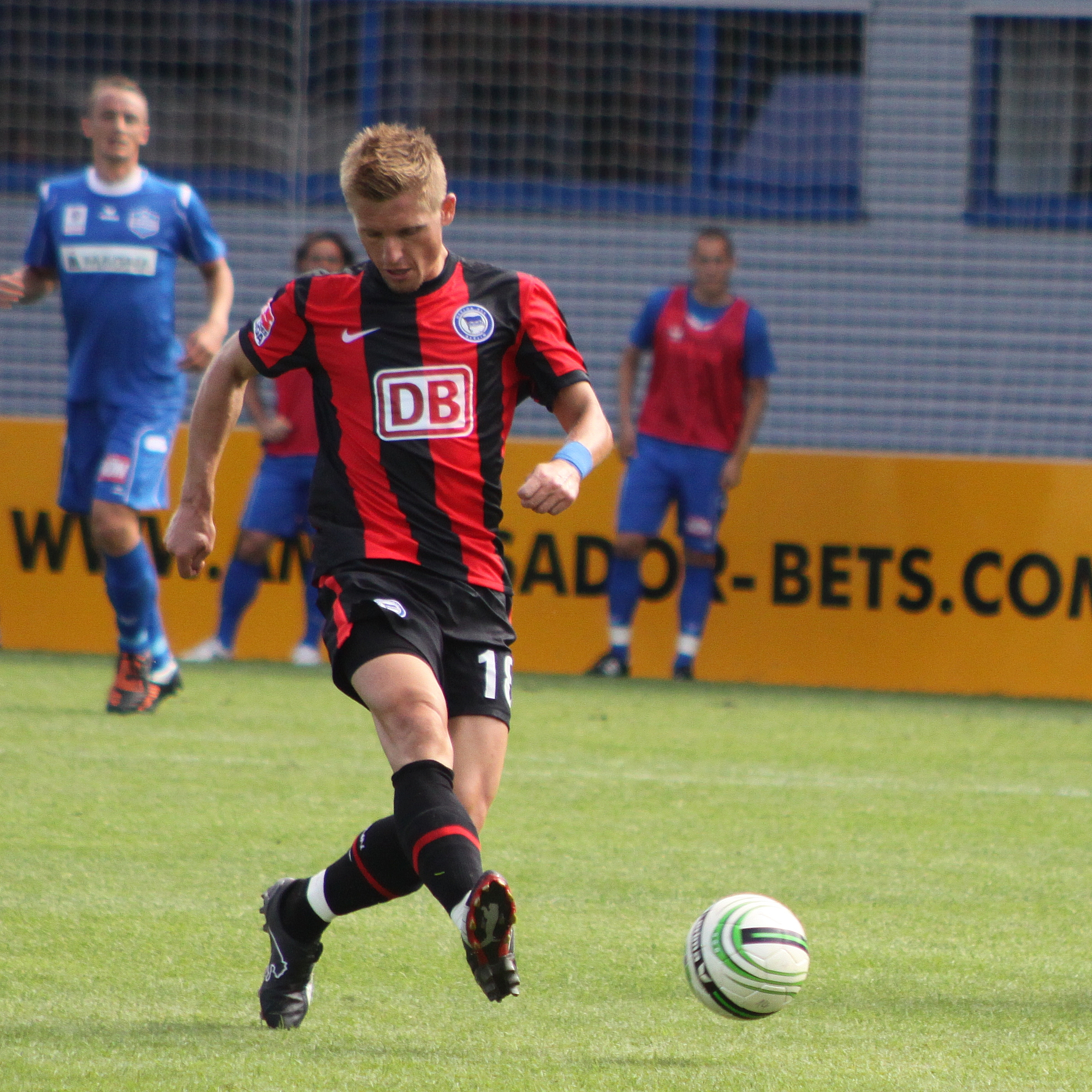 Artur Wichniarek – Hertha BSC Berlin (4)